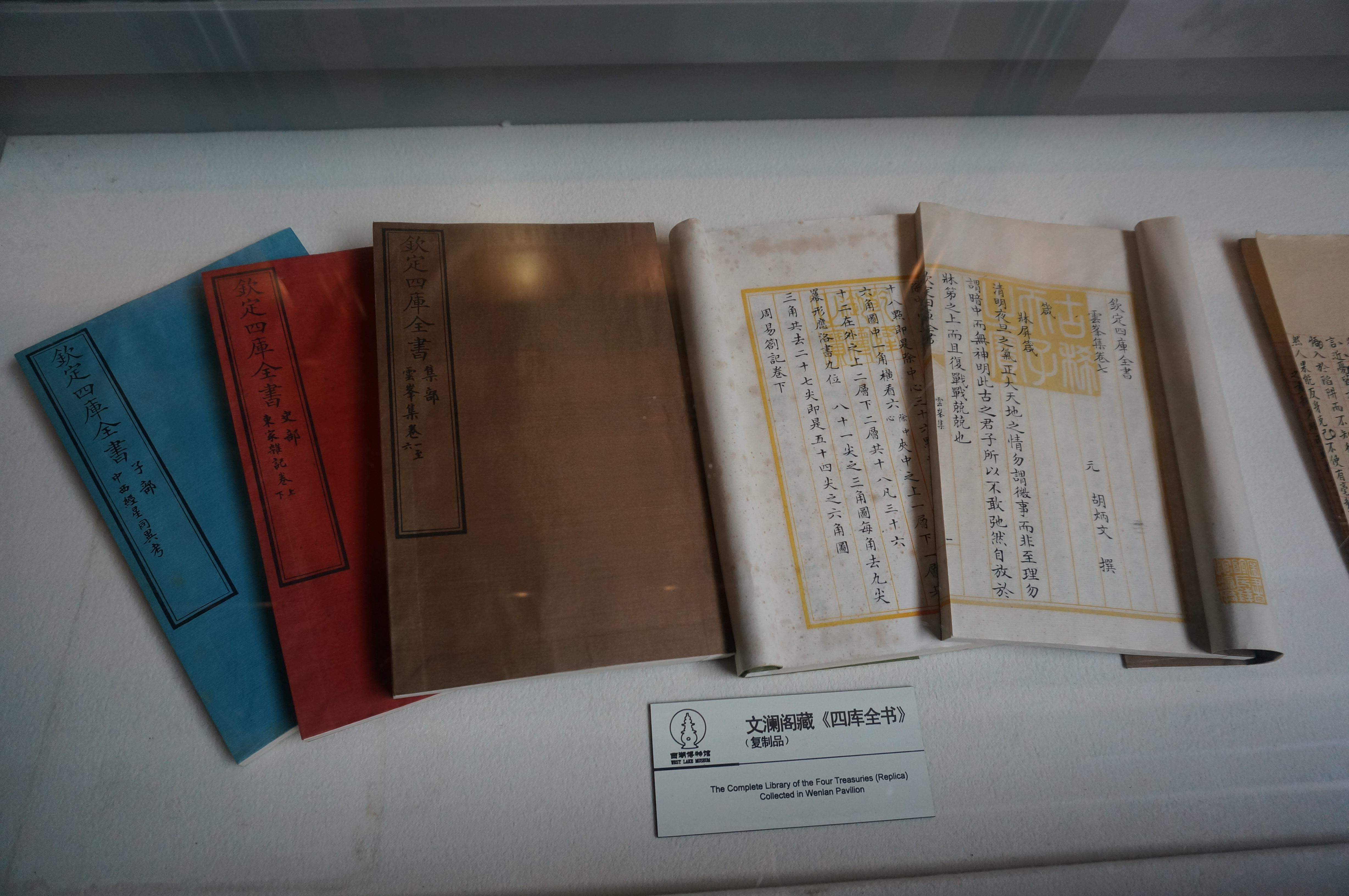 文澜阁藏《四库全书》复制品，西湖博物馆藏。